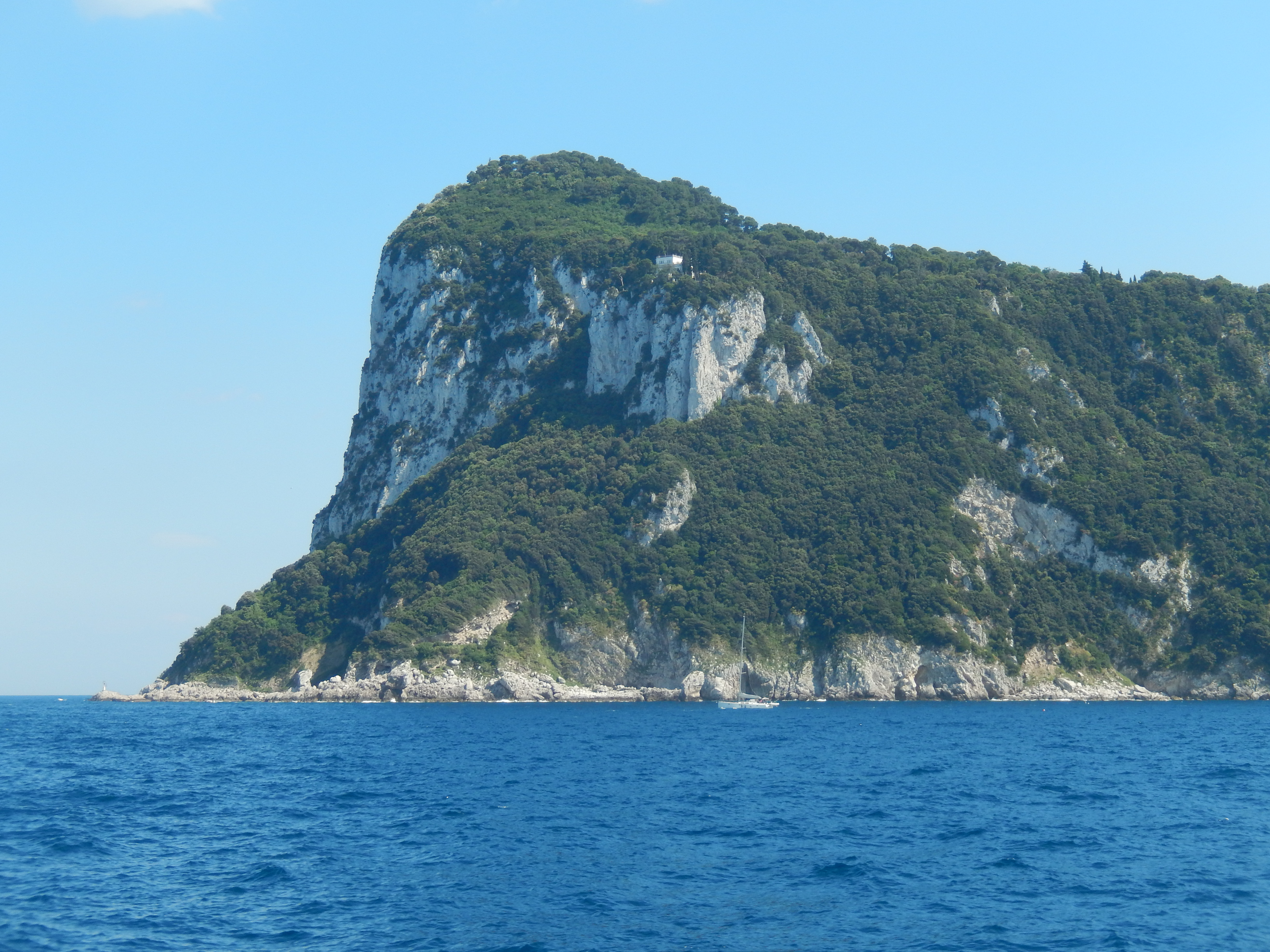 Ostseite Capris mit der Villa Lysis etwas oberhalb der Bildmitte